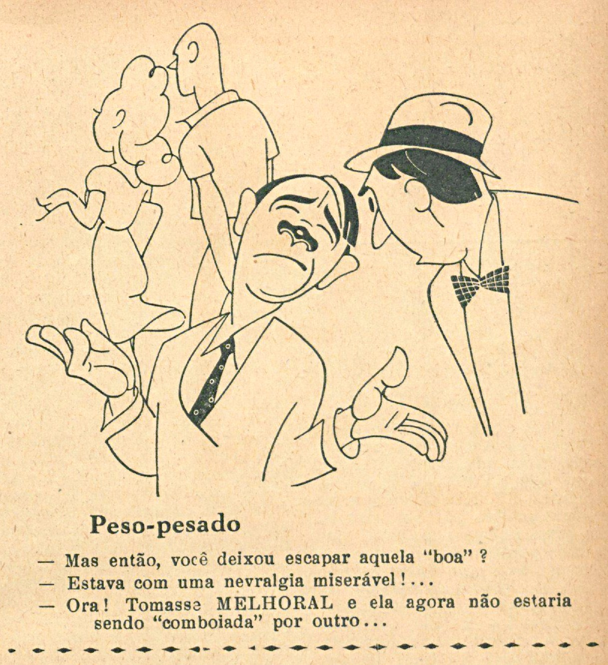 Propaganda do remédio "Melhoral" na revista "Careta" do Rio de Janeiro, usando de caricatura com teor sexista.